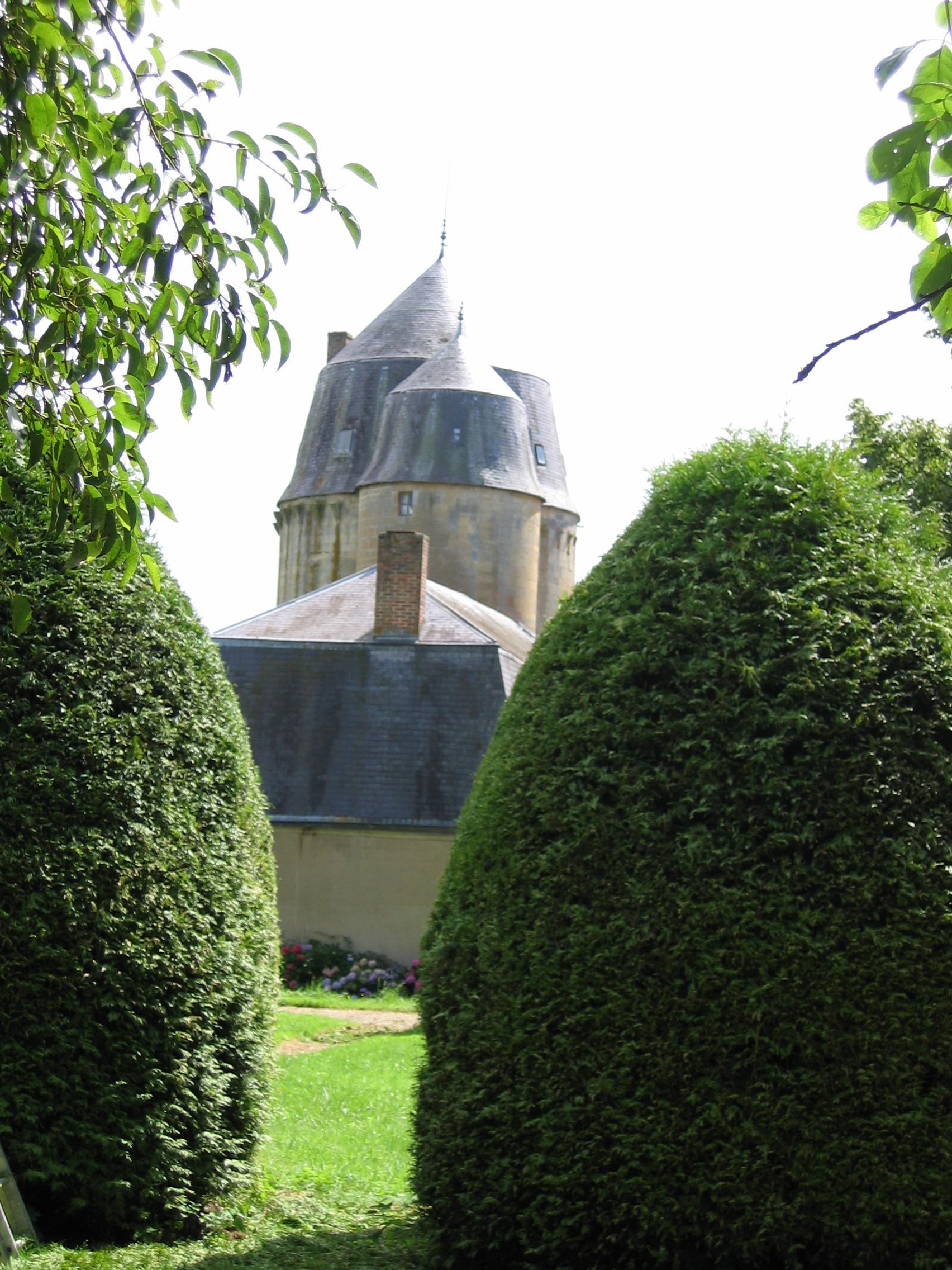 Donjon de Day, vue de plain-pied ouest, commune de Neuville-Day, Ardennes, france